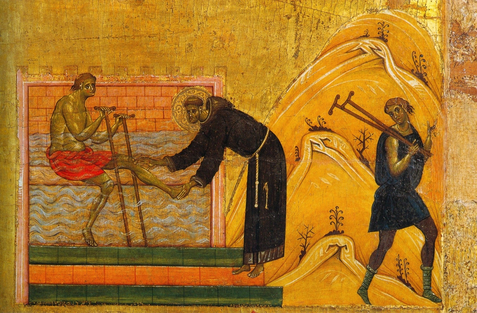 detail